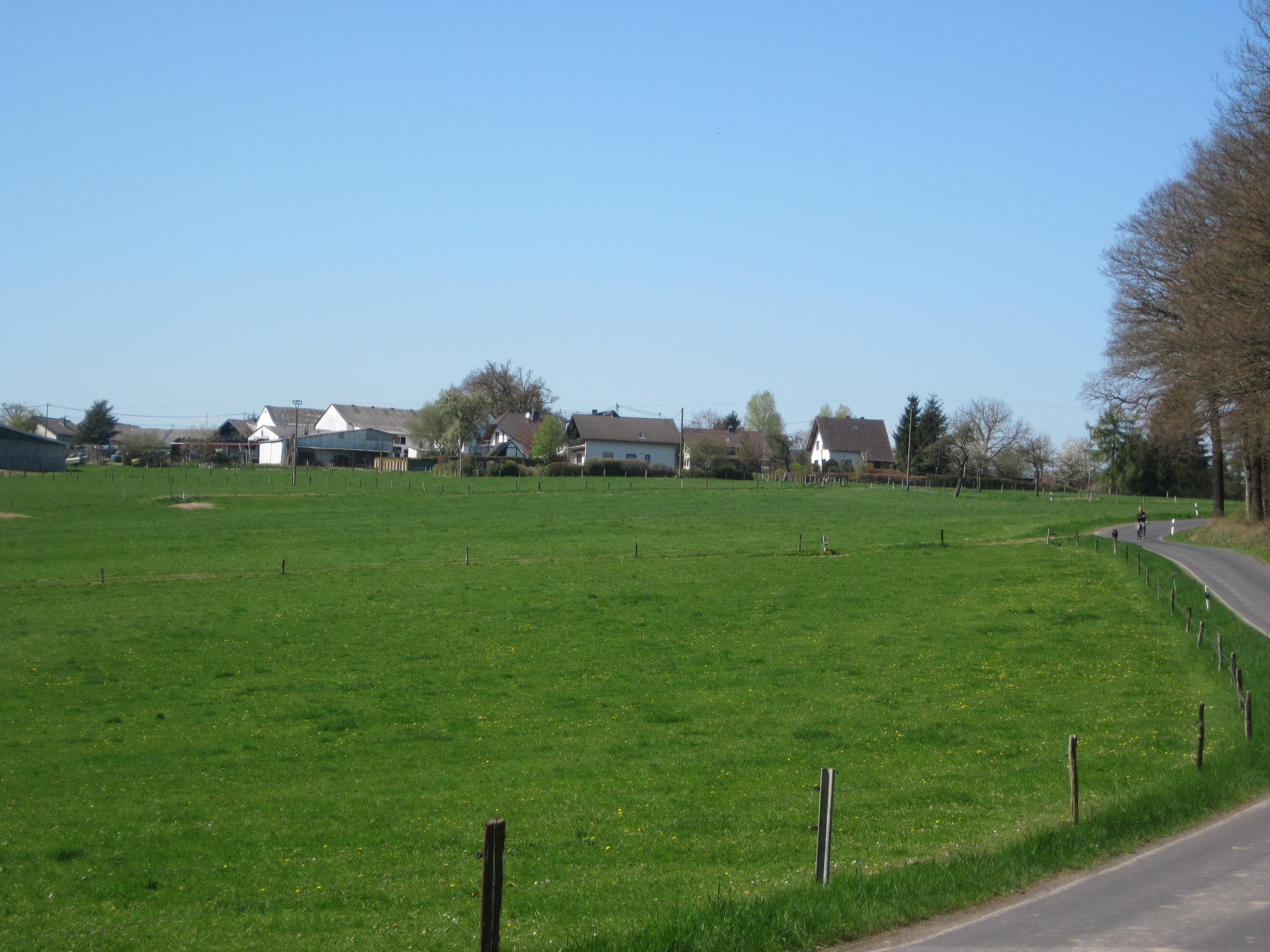 Asbach (Westerwald) Ortsteil Krankel